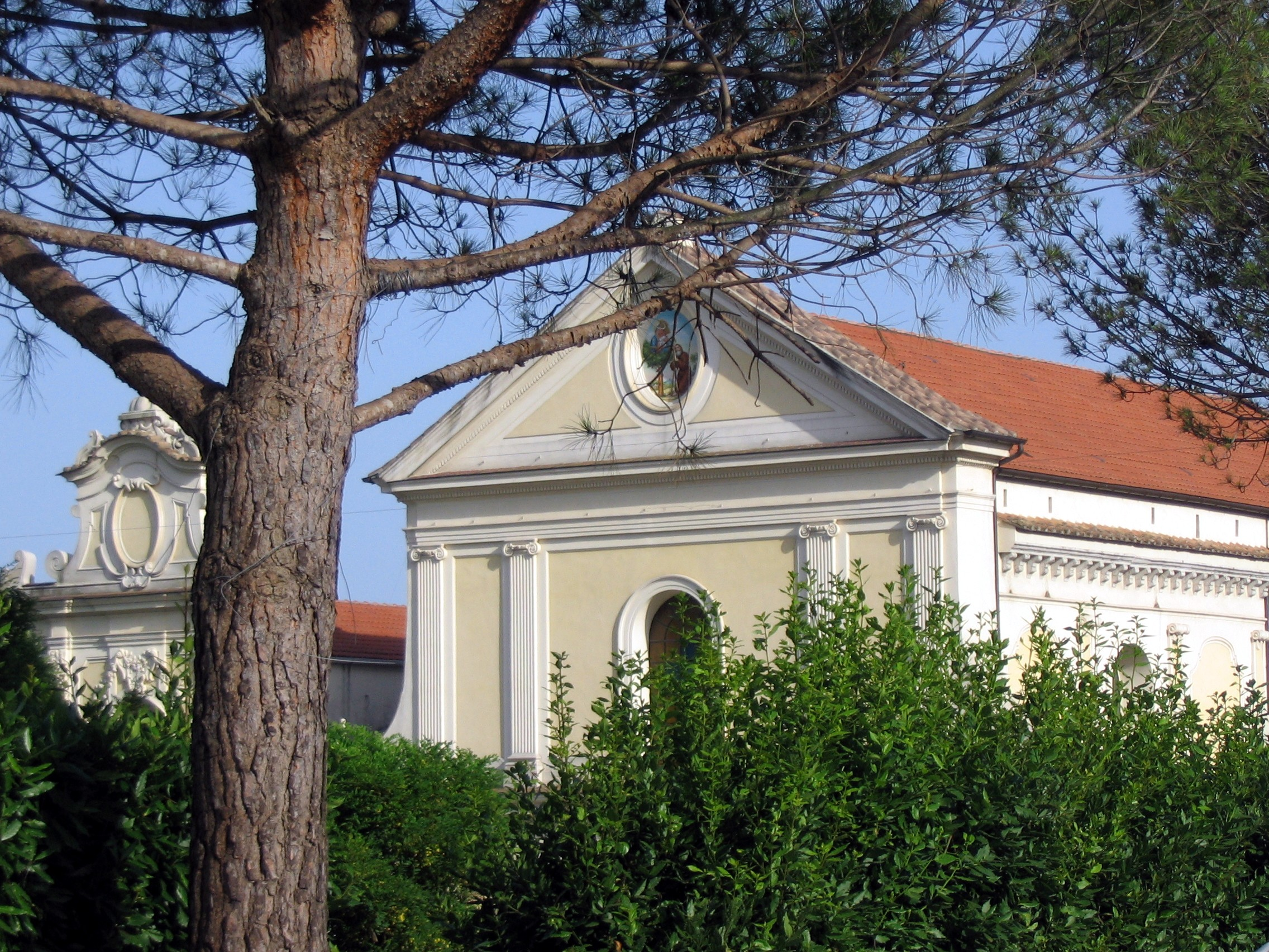 Cava de' Tirreni - Chiesa della Madonna dell'Olmo